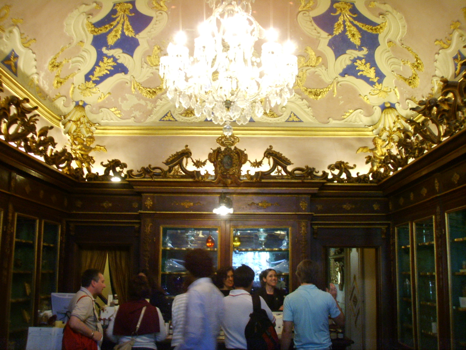 Officina_di_Santa_Maria_Novella, antica_erboristeria In Florence